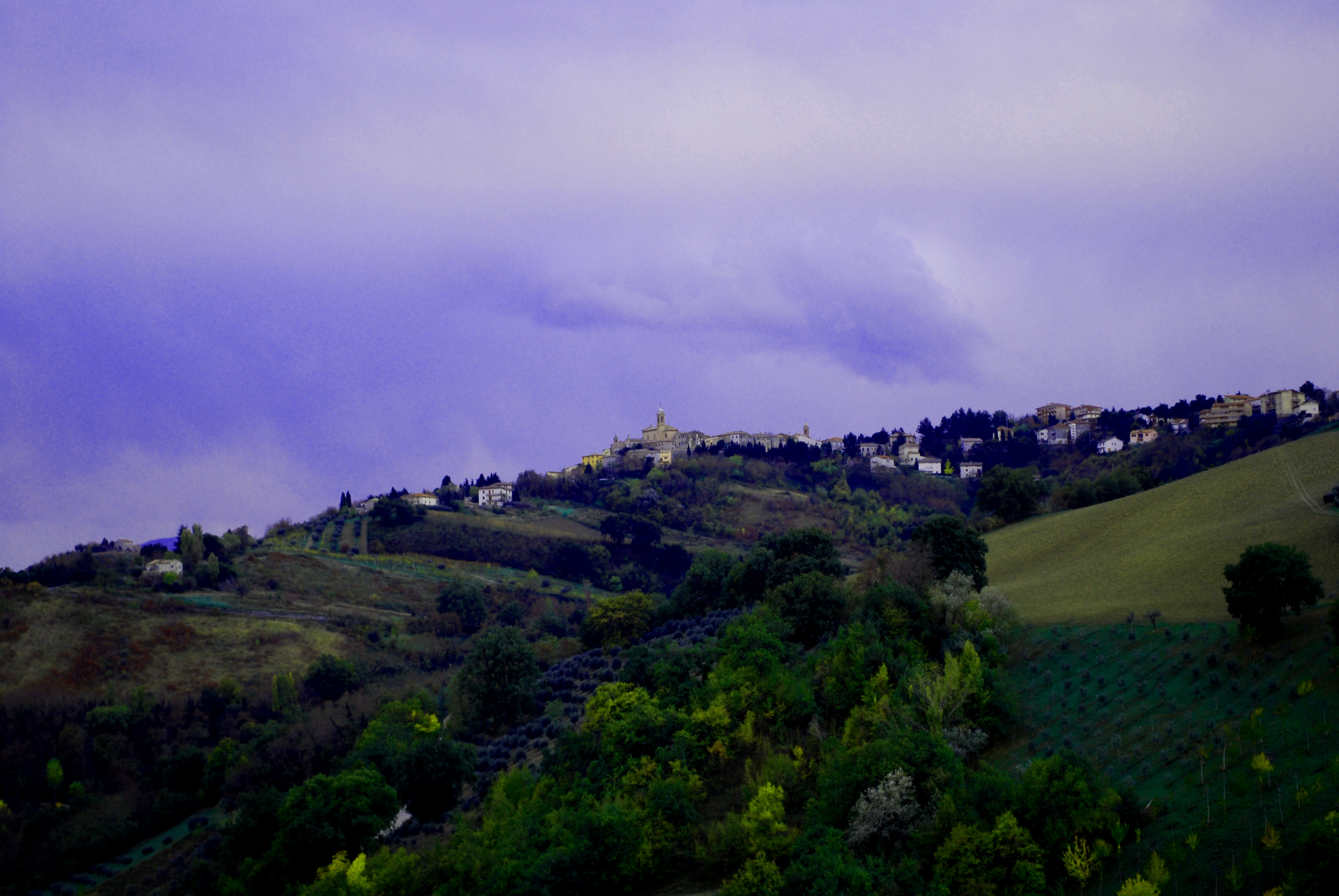 Vista panoramica di Poggio San Marcello (AN), Italy